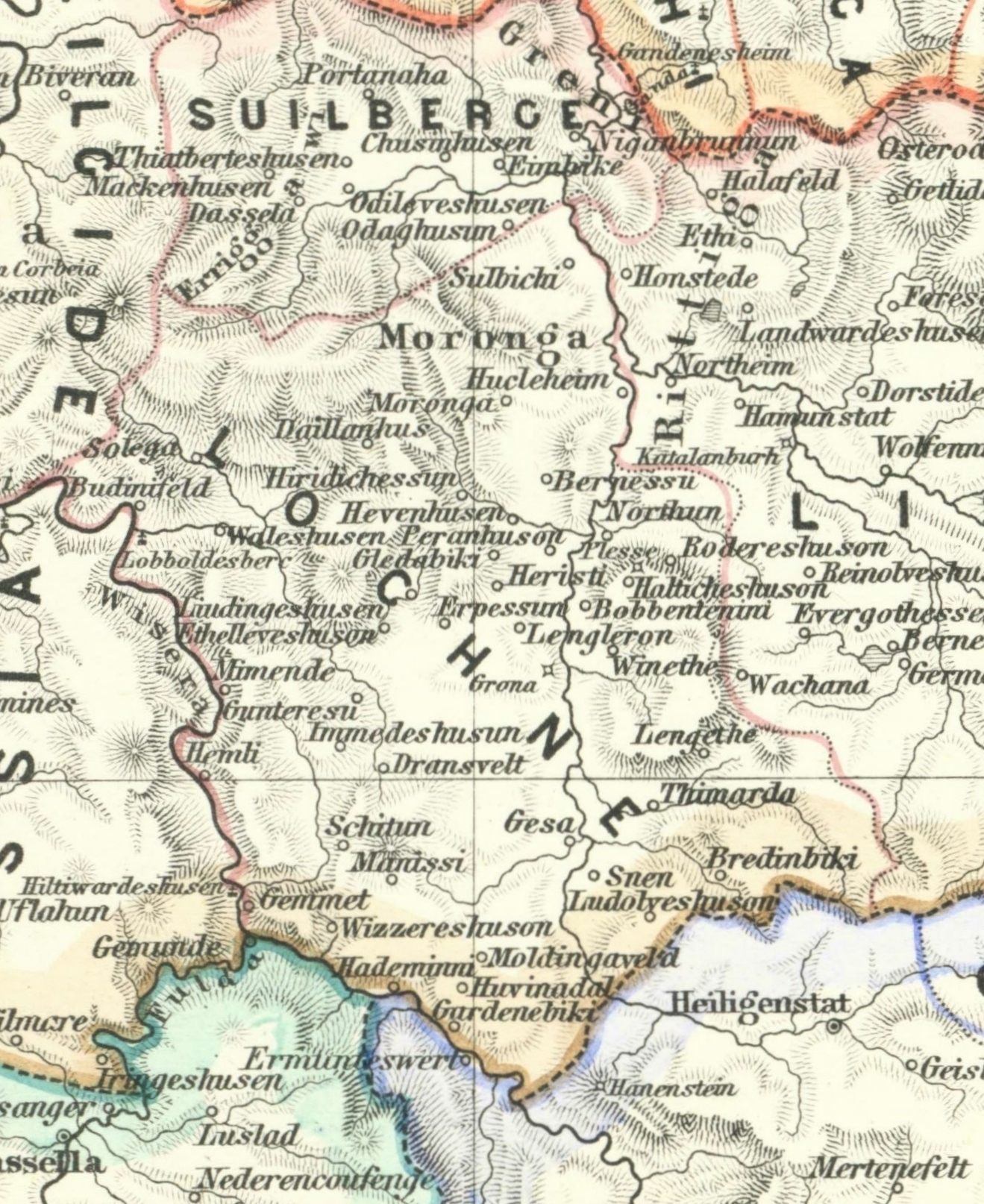 Deutschlands Gaue III: Sachsen, Nördliches Thüringen: Kartenauschnitt Leinegau